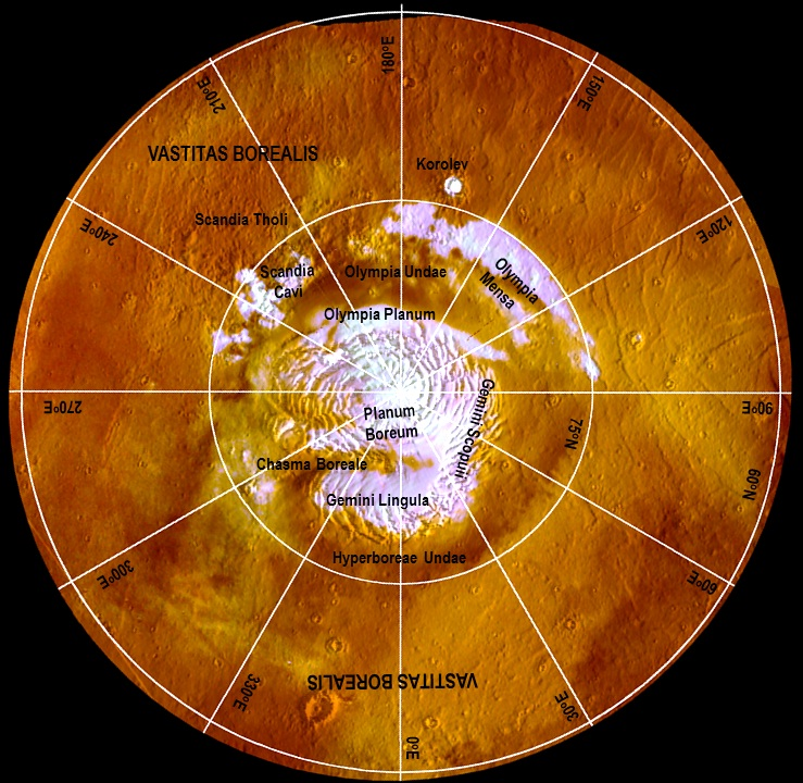 Ici nous pouvons voir l'hémisphère Nord de Mars et plus particulièrement Olympia Planum en son centre et donc à un point le plus au Nord de la planète.